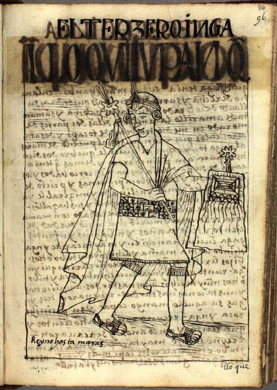 El primer nueva corónica y buen gobierno